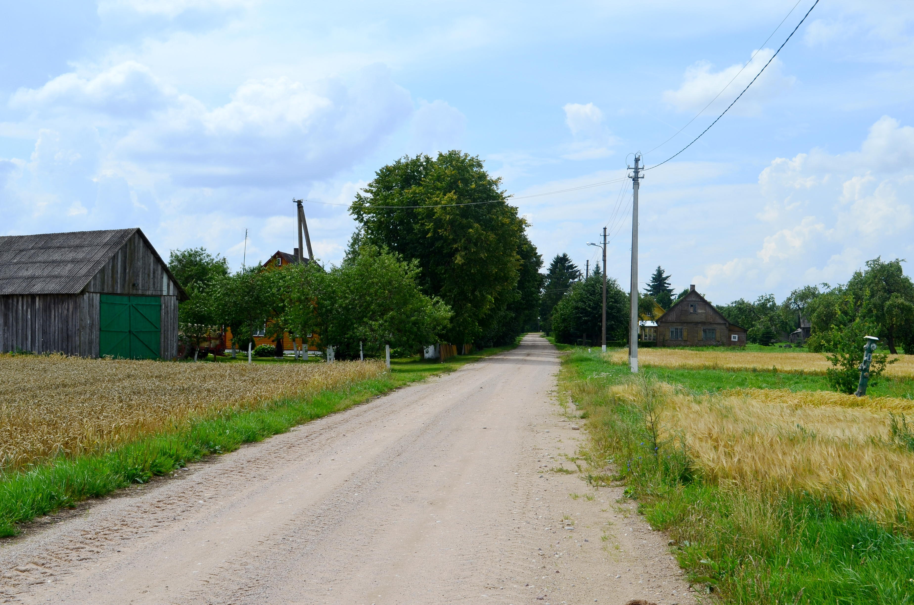 Liolių k., Šėtos sen., Kėdainių raj.